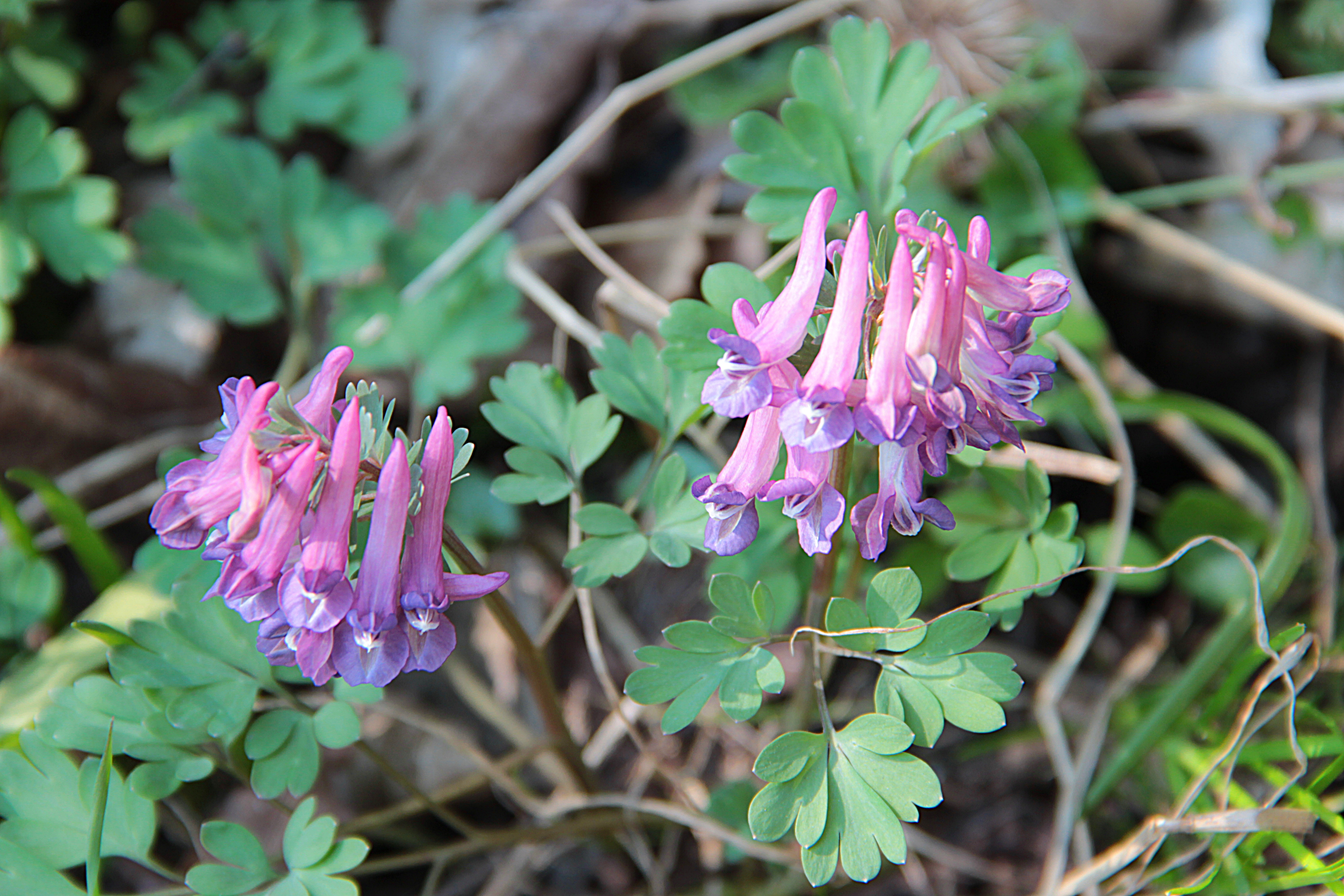 Corydale à bulbe plein Corydalis solida photographiée le long d'un sentier forestier dans le Bois d'Havré en Belgique.